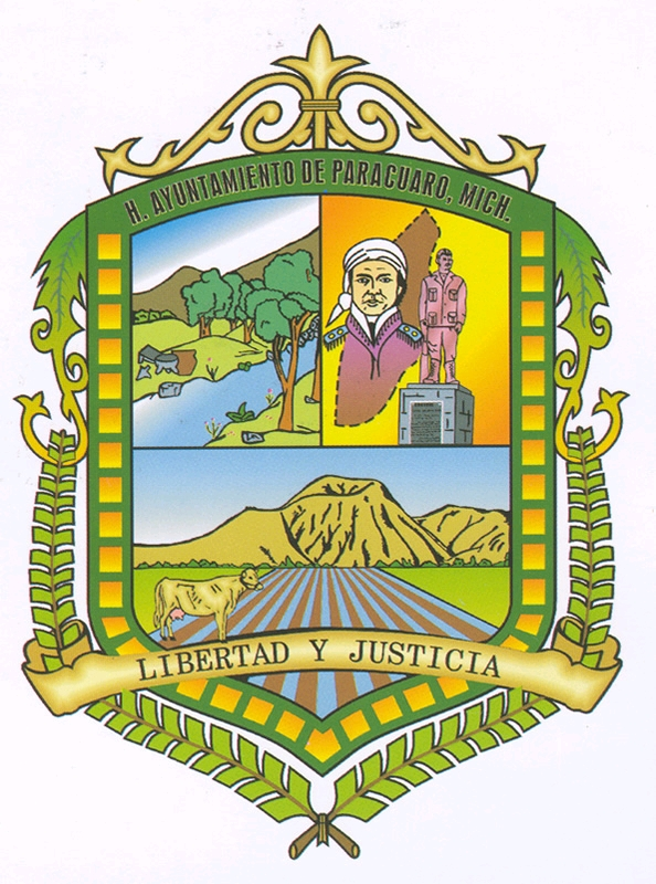 Escudo de Parácuaro Michoacan